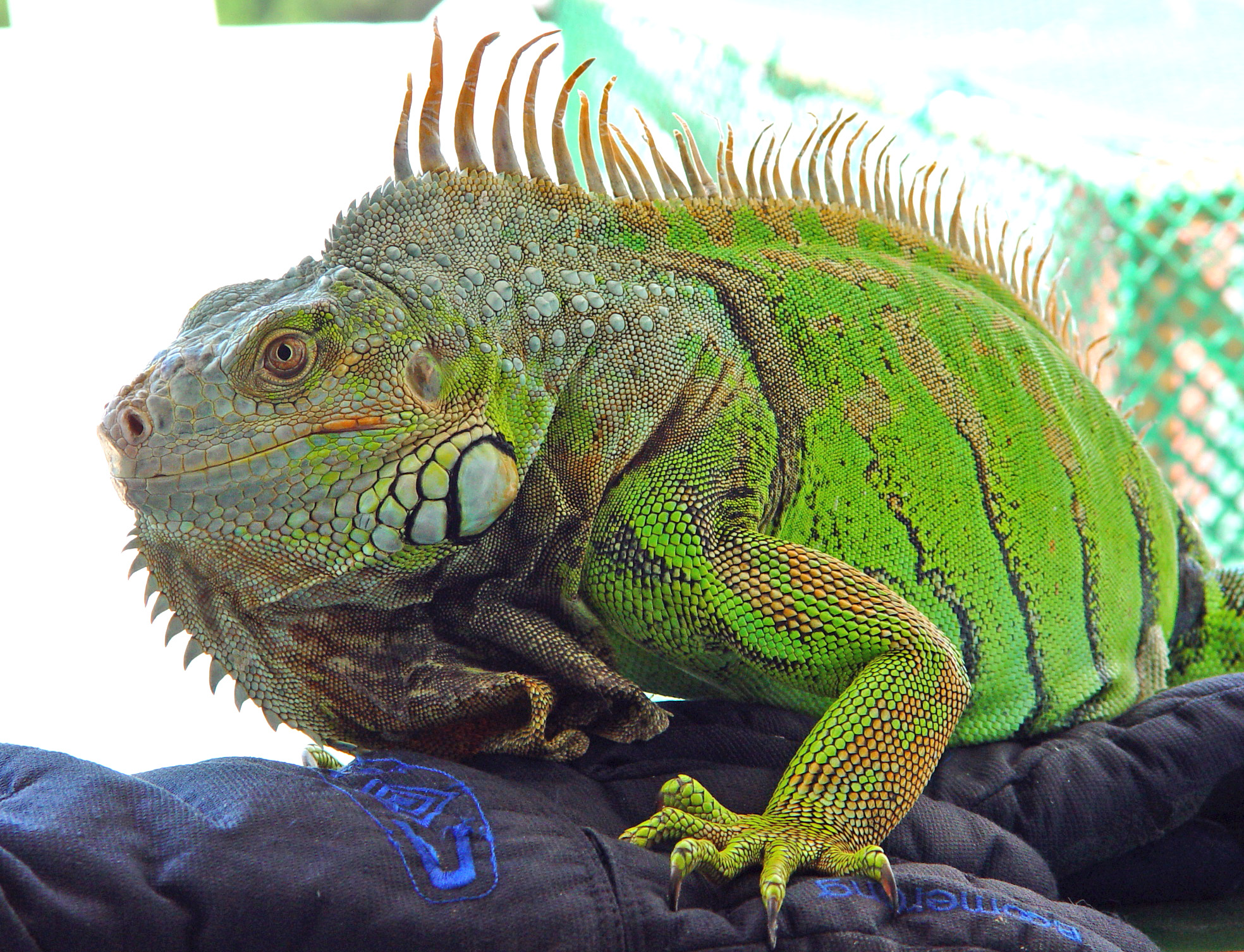 Iguana verde adulta